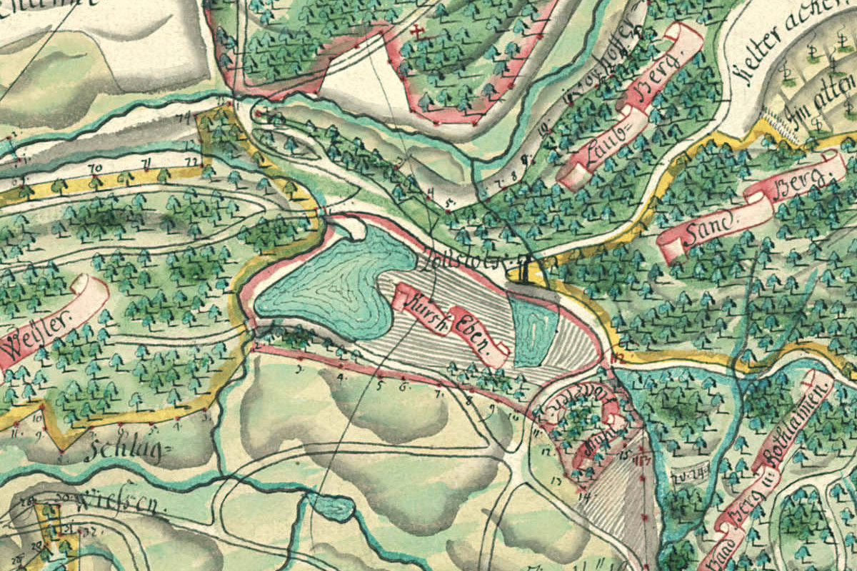 Karte des Bleichsees bei Löwenstein, entstanden zwischen 1751 und 1759 (StAWt F K 263, Ausschnitt). Süden ist (ungefähr) oben.